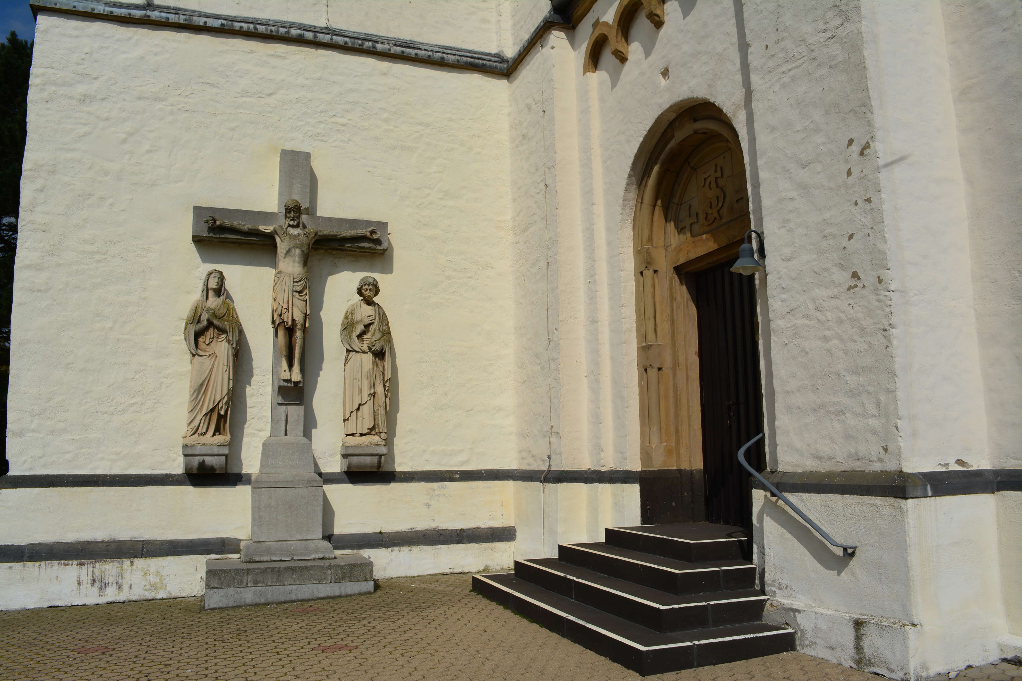 St. Martinus, Düren - Birgel This is a photograph of an architectural monument. /003